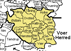 Voer Herred, Skanderborg Amt, Denmark Source: Map by Svend-Erik Christiansen